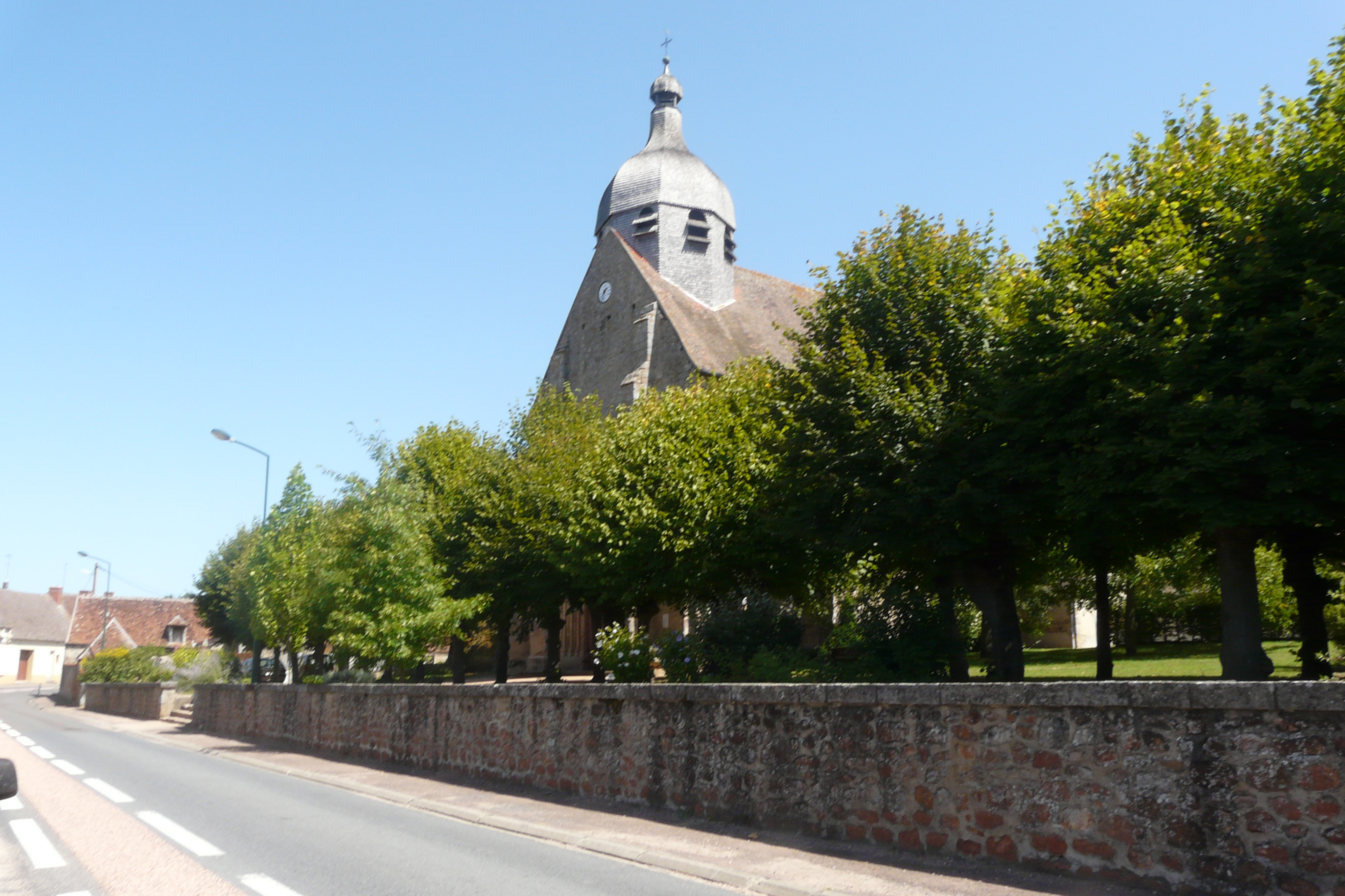 Vue sur l'église d'Urçay